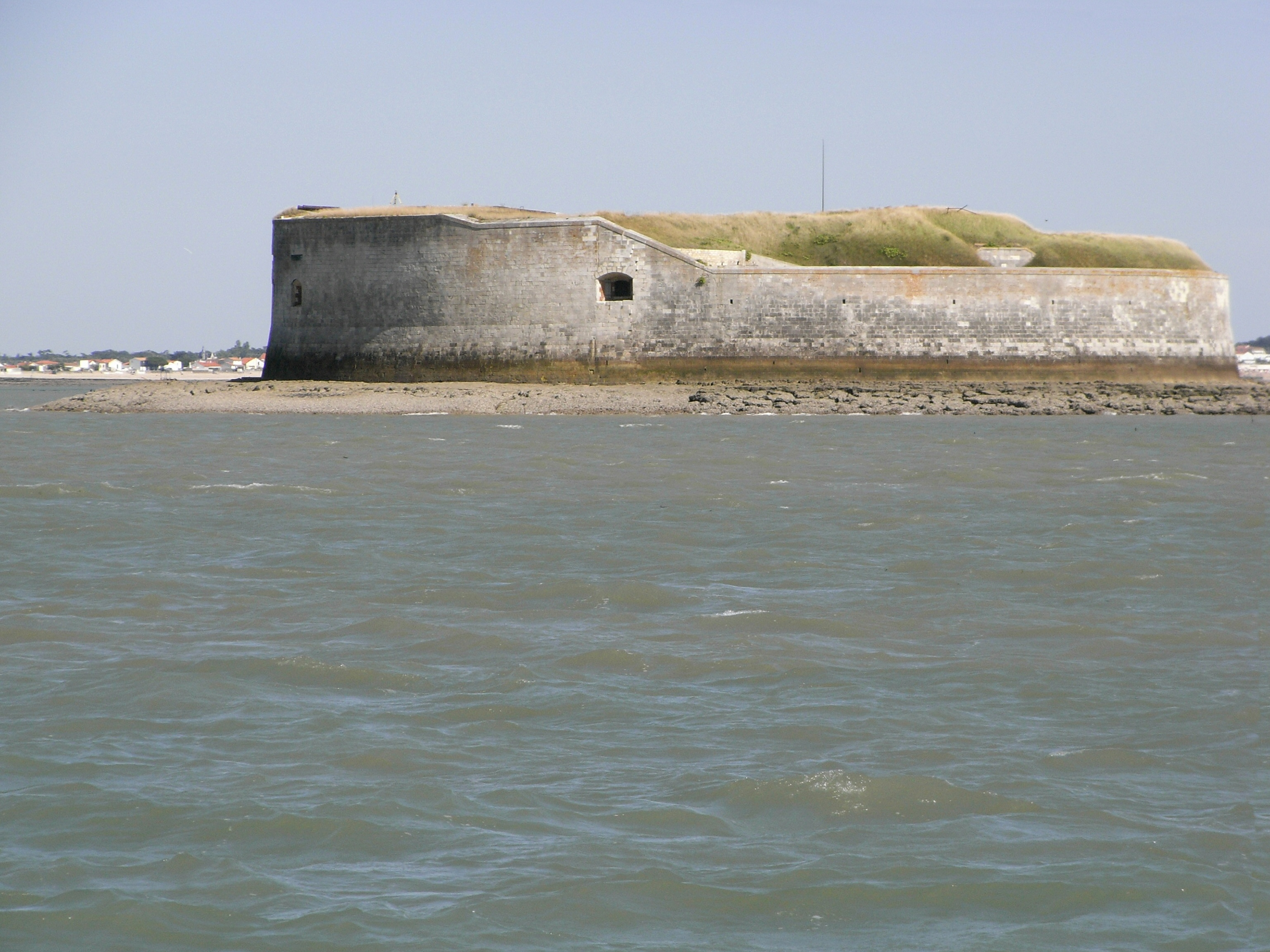 Fort Énet dans la Rade de l'Île d'Aix en Charente-Maritime (France)